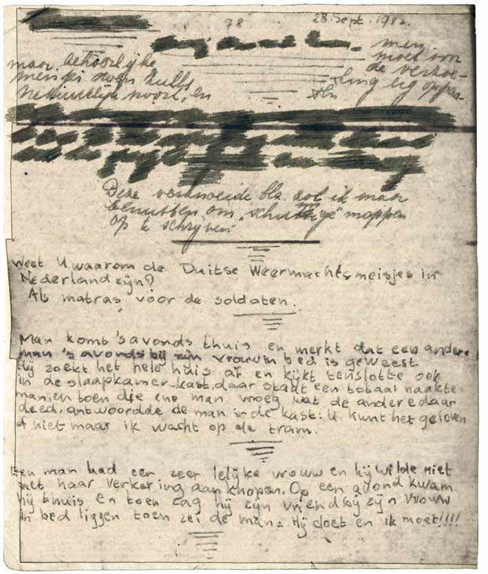 Eerste afgeplakte pagina dagboek Anne Frank men moet voor de verzoeking erg oppassen maar behoorlijke meisjes doen zulks natuurlijk nooit, en Deze verknoeide blz. zal ik maar benutten om “schunnige” moppen op te schrijven WEET U WAAROM DE DUITSE WEERMACHTSMEISJES IN NEDERLAND ZIJN? ALS MATRAS VOOR DE SOLDATEN. MAN KOMT ’S AVONDS THUIS EN MERKT DAT EEN ANDERE MAN ’S AVONDS BIJ ZIJN VROUW IN BED IS GEWEEST. HIJ ZOEKT HET HELE HUIS AF EN KIJKT TENSLOTTE OOK IN DE SLAAPKAMER-KAST, DAAR STAAT EEN TOTAAL NAAKTE MAN, EN TOEN DIE ENE MAN VROEG WAT DE ANDERE DAAR DEED, ANTWOORDDE DE MAN IN DE KAST: U KUNT HET GELOVEN OF NIET MAAR IK WACHT OP DE TRAM. EEN MAN HAD EEN ZEER LELIJKE VROUW EN HIJ WILDE NIET MET HAAR VERKERING AANKNOPEN. OP EEN AVOND KWAM HIJ THUIS EN TOEN ZAG HIJ ZIJN VRIEND BIJ ZIJN VROUW IN BED LIGGEN TOEN ZEI DE MAN: HIJ DOET EN IK MOET!!!!